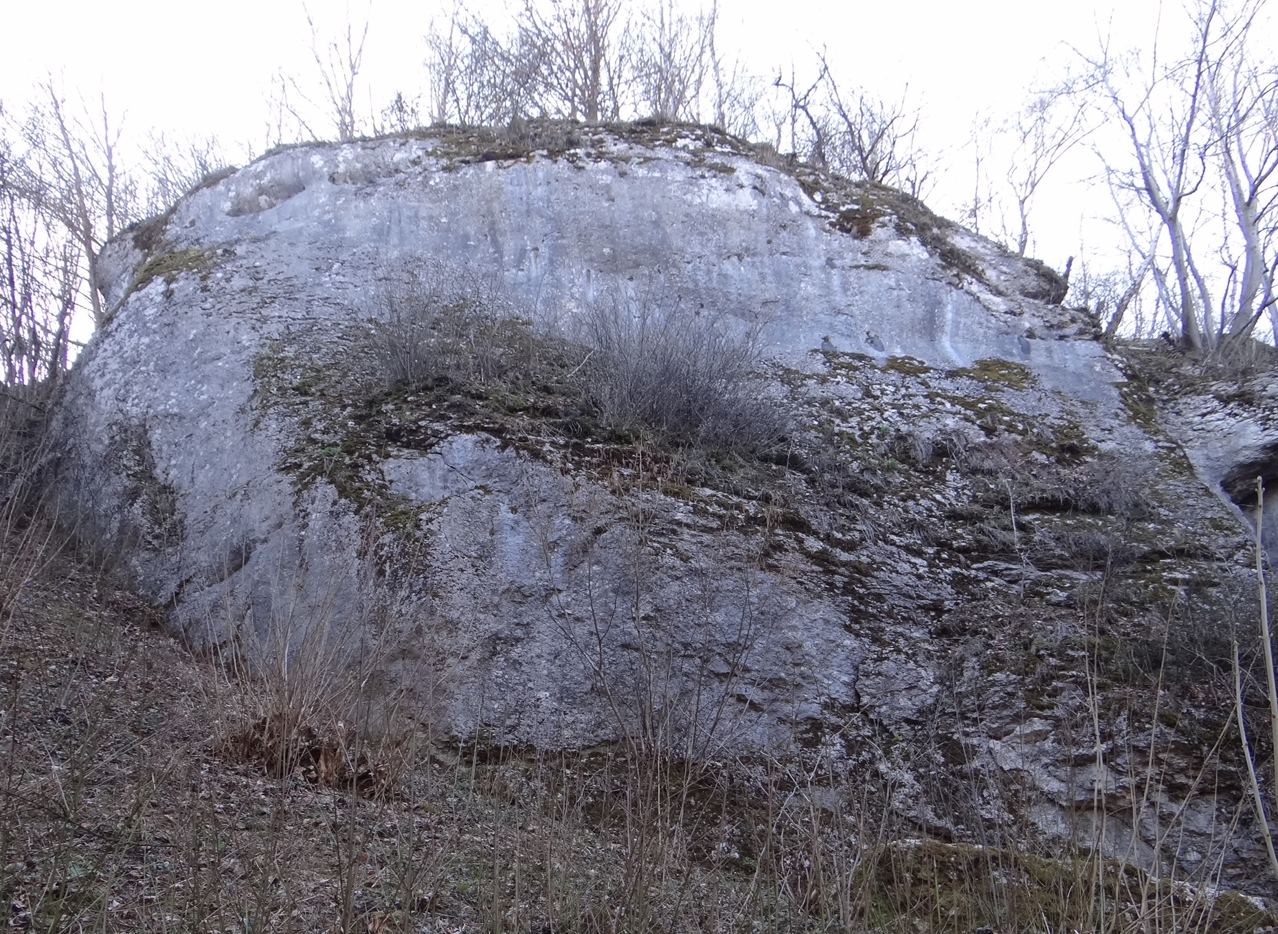 Skała Położna w Dolinie Brzoskwinki